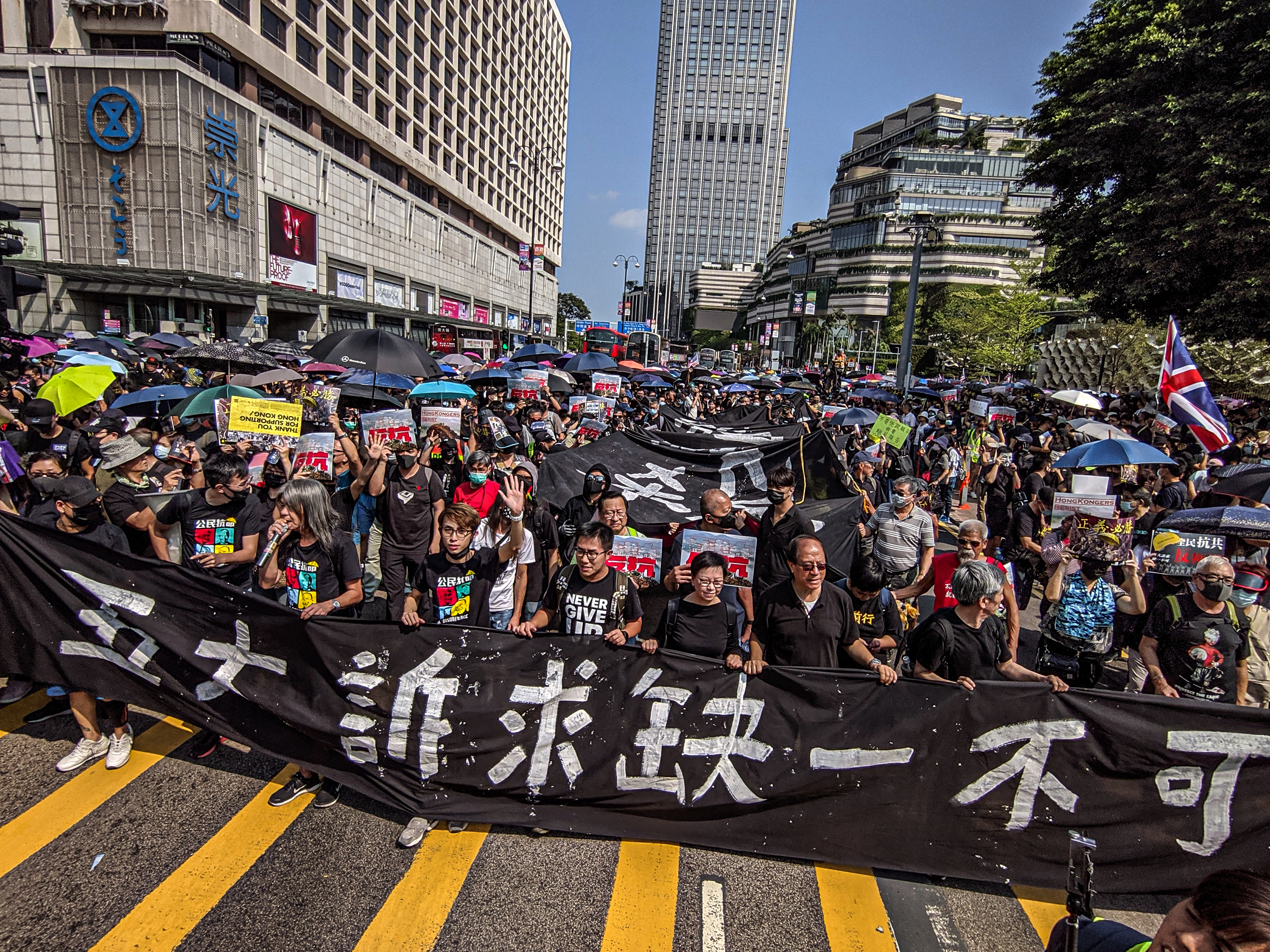 IMG_20191020_133654